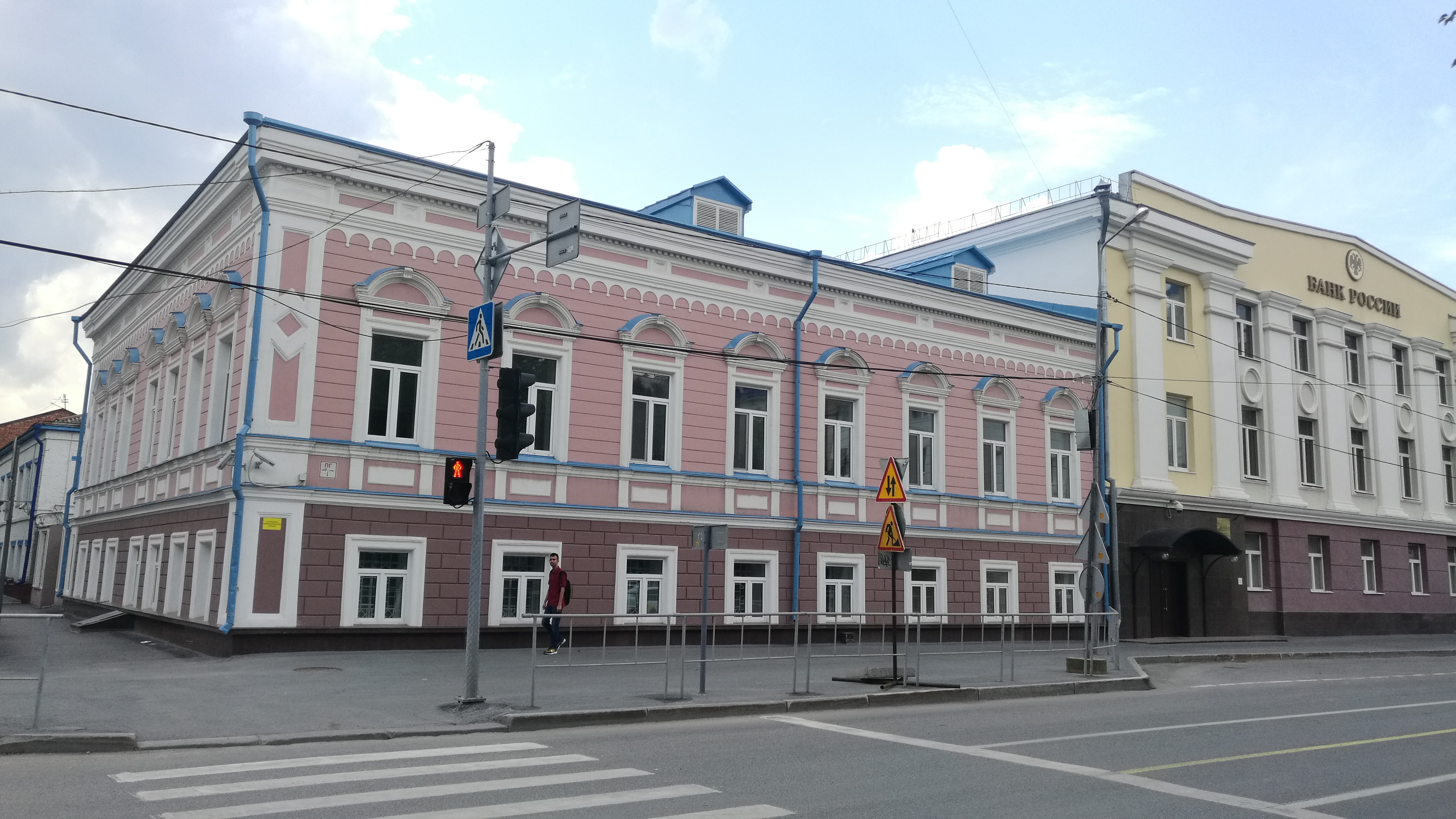 Banko de Rusio. Tjumeno, Rusio.